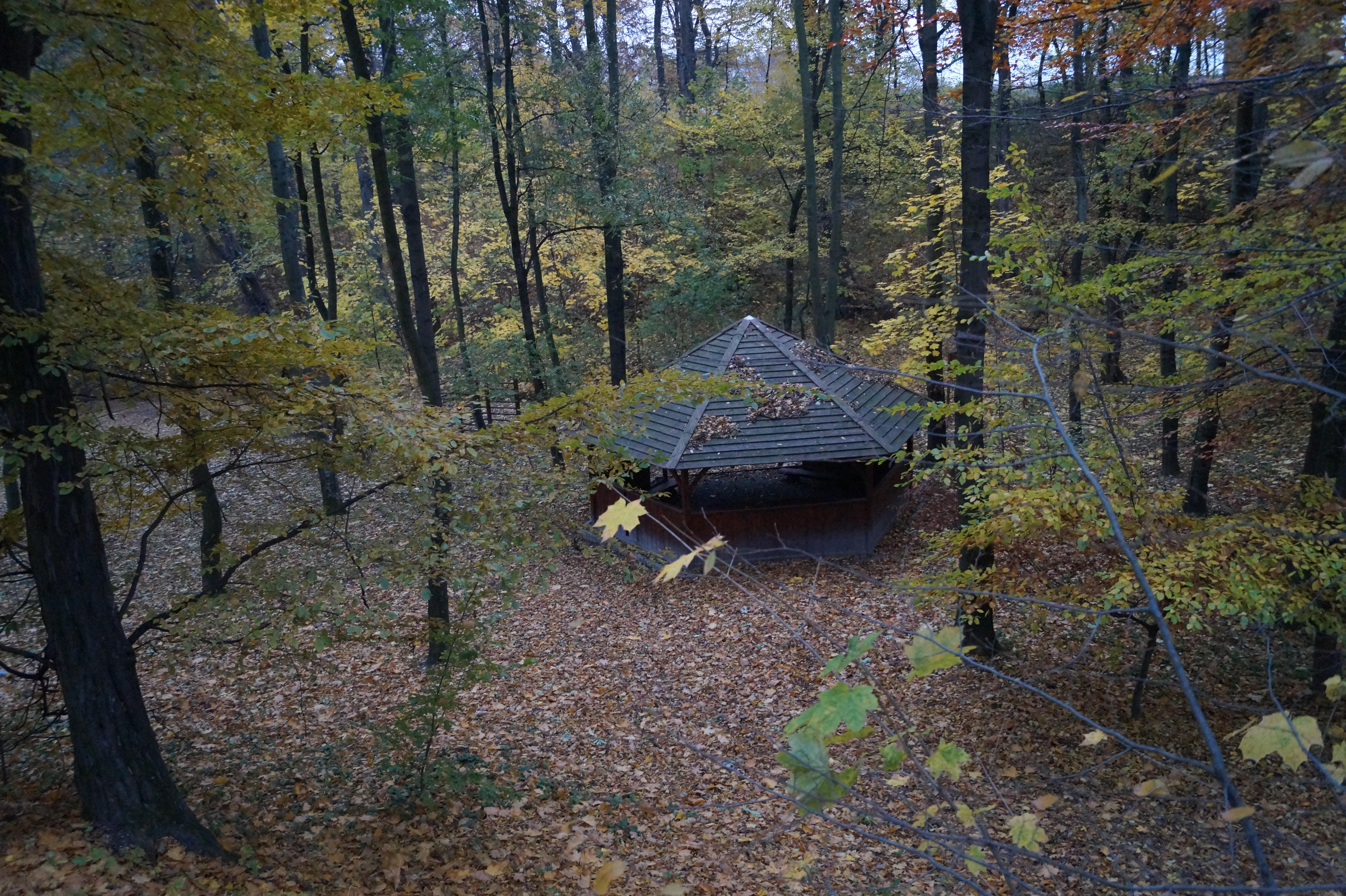 Altana w miejscu schadzek słynnej w całej Europie z urody i flirtów "Pięknej Gabrieli"